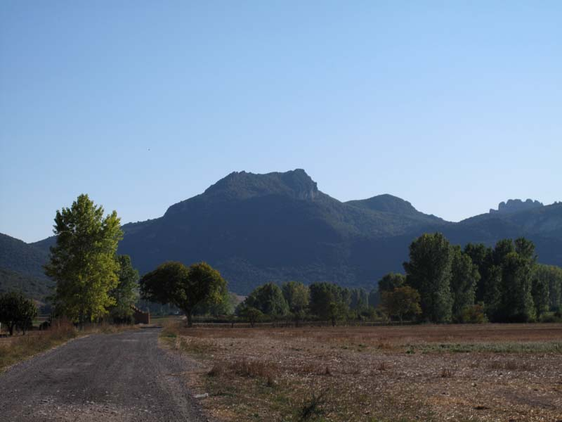 Montes Obarenes, en el entorno de Cellorigo, desde Orón (Miranda de Ebro)